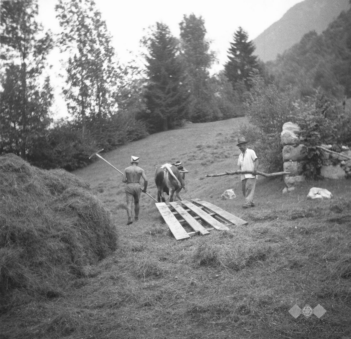 Zahouc, Dromla nad Čezsočo. Vol s "senmi" za prevažanje sena v hribovitih senožetih.